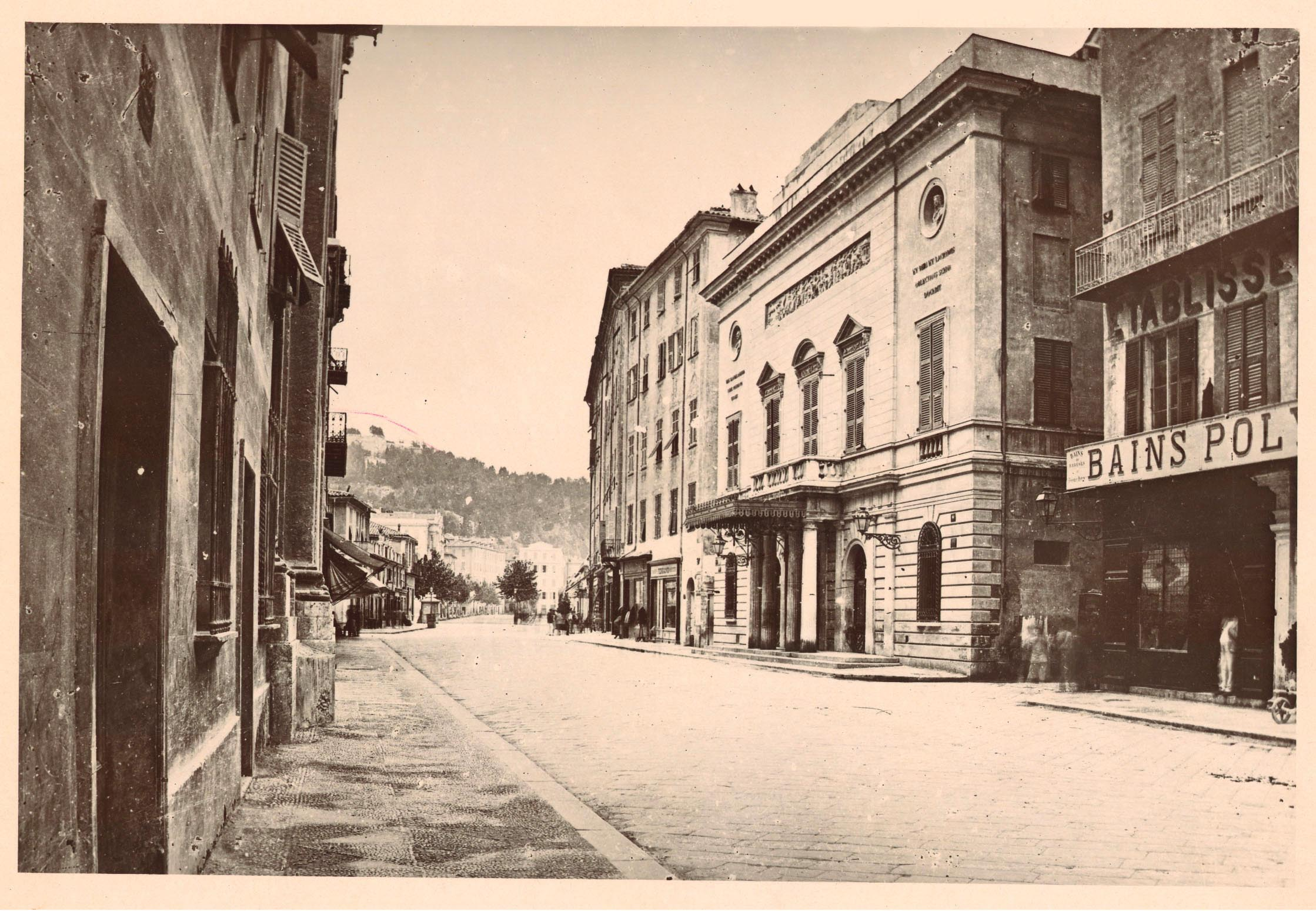 La façade de l'Opéra de Nice, rue St François de Paul en 1876.